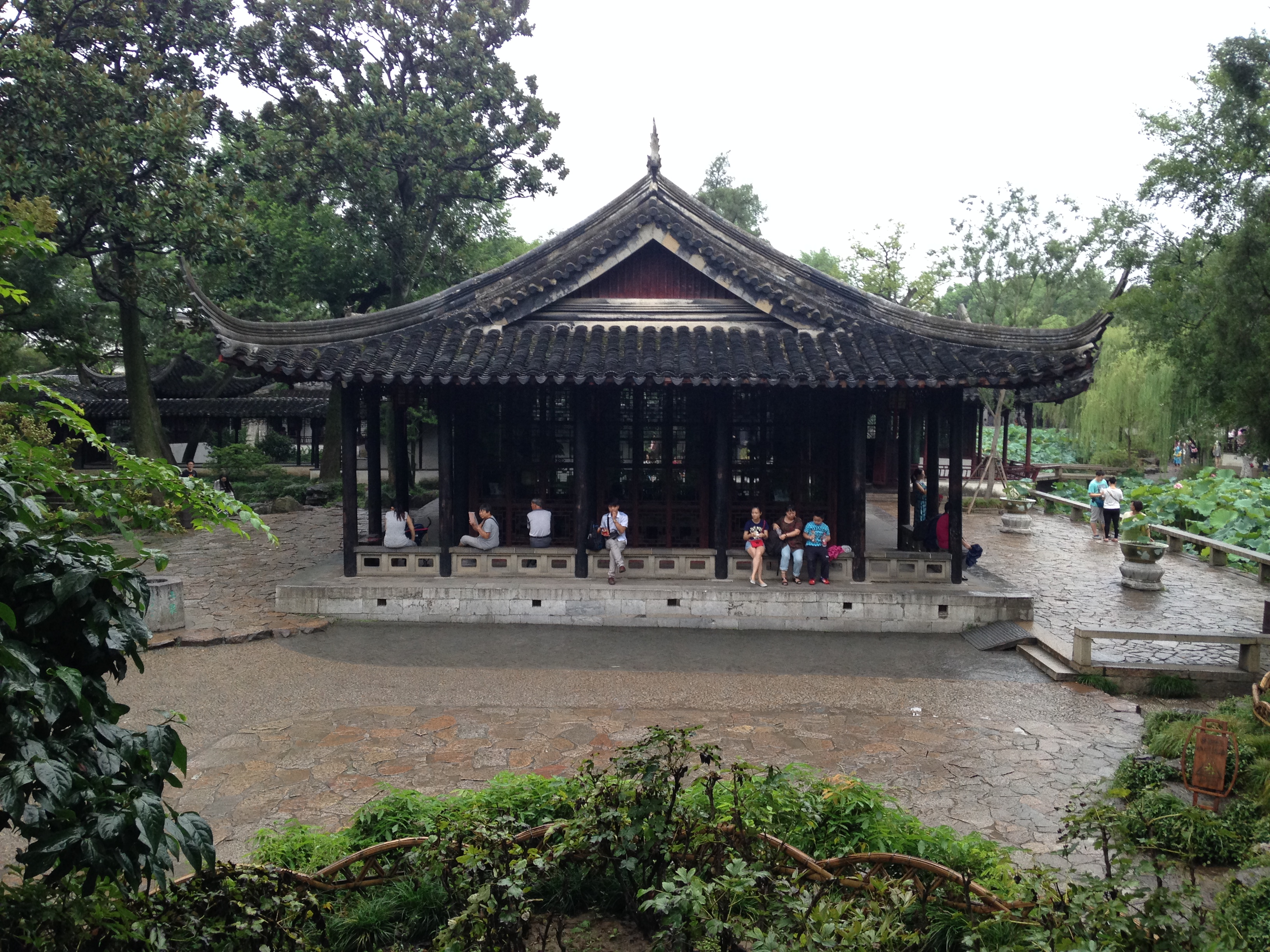 拙政園・遠香堂